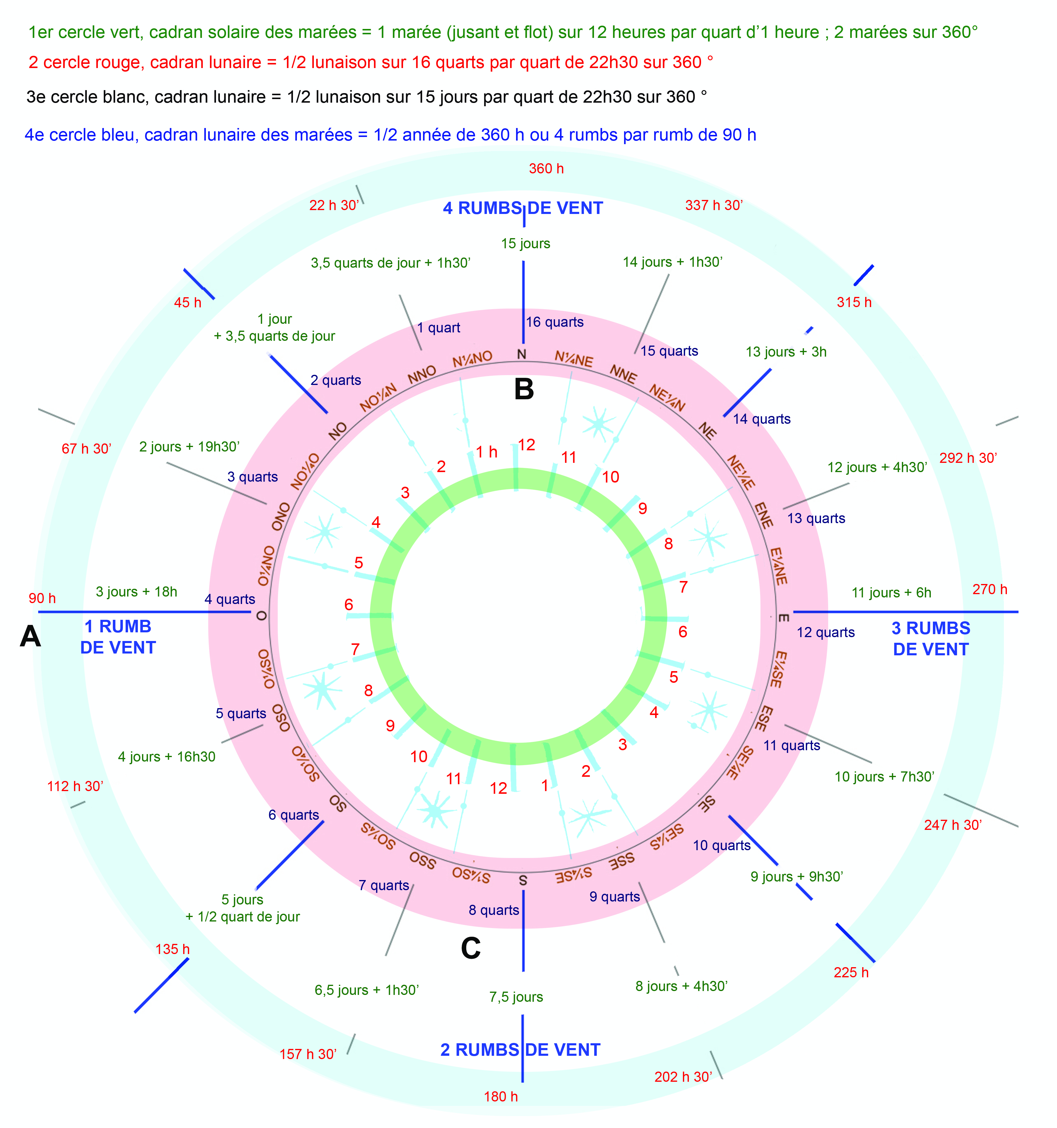 Roue